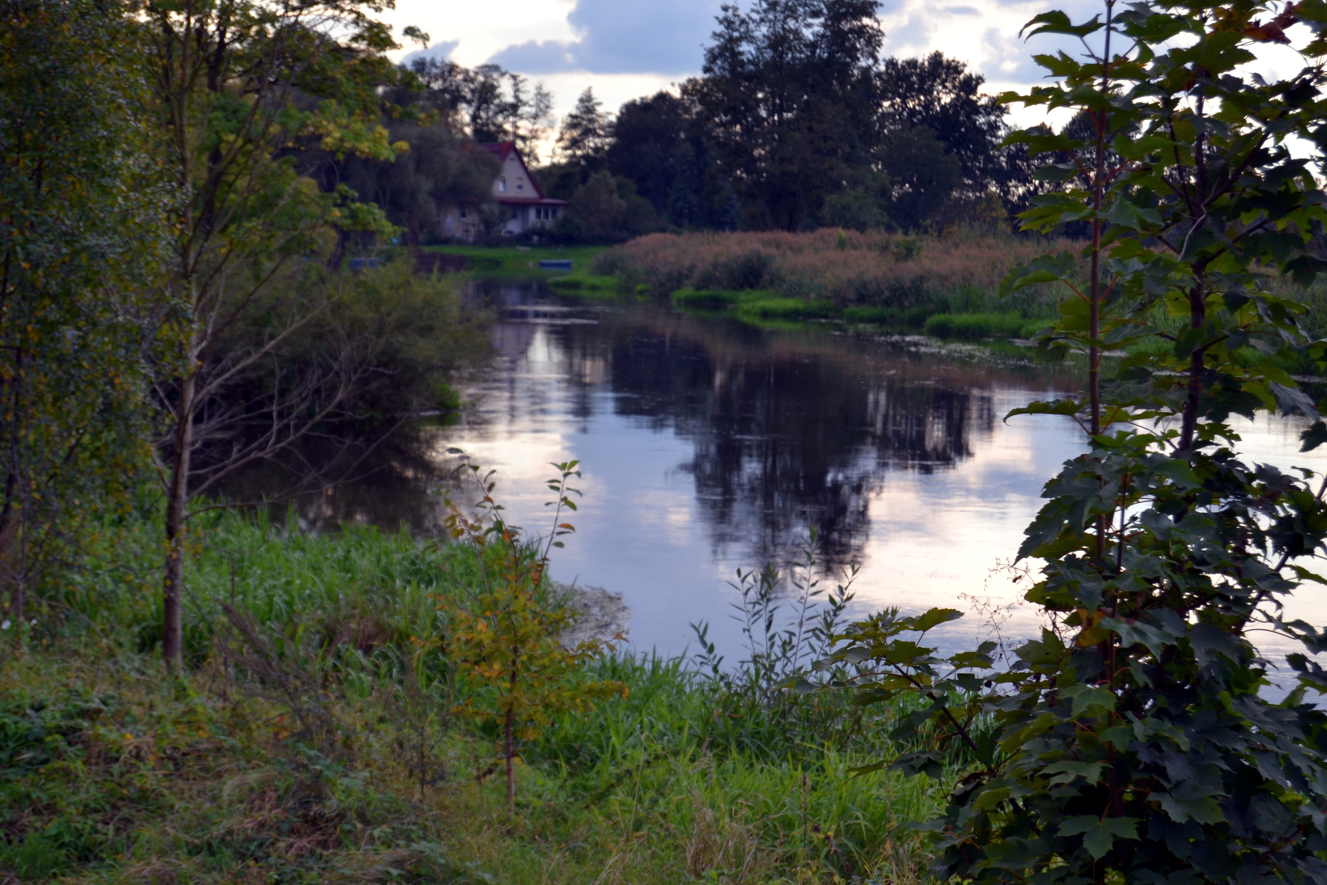 Spreeverlauf bei zwischen Neu-Hartmannsdorf und Hartmannsdorf